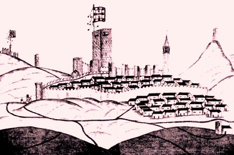 Castelo de Olivença, desenhado por Duarte D'Armas, escudeiro do rei português D. Manuel I, em 1509. Castle of Olivença, drawing by Duarte D'Armas (1509).